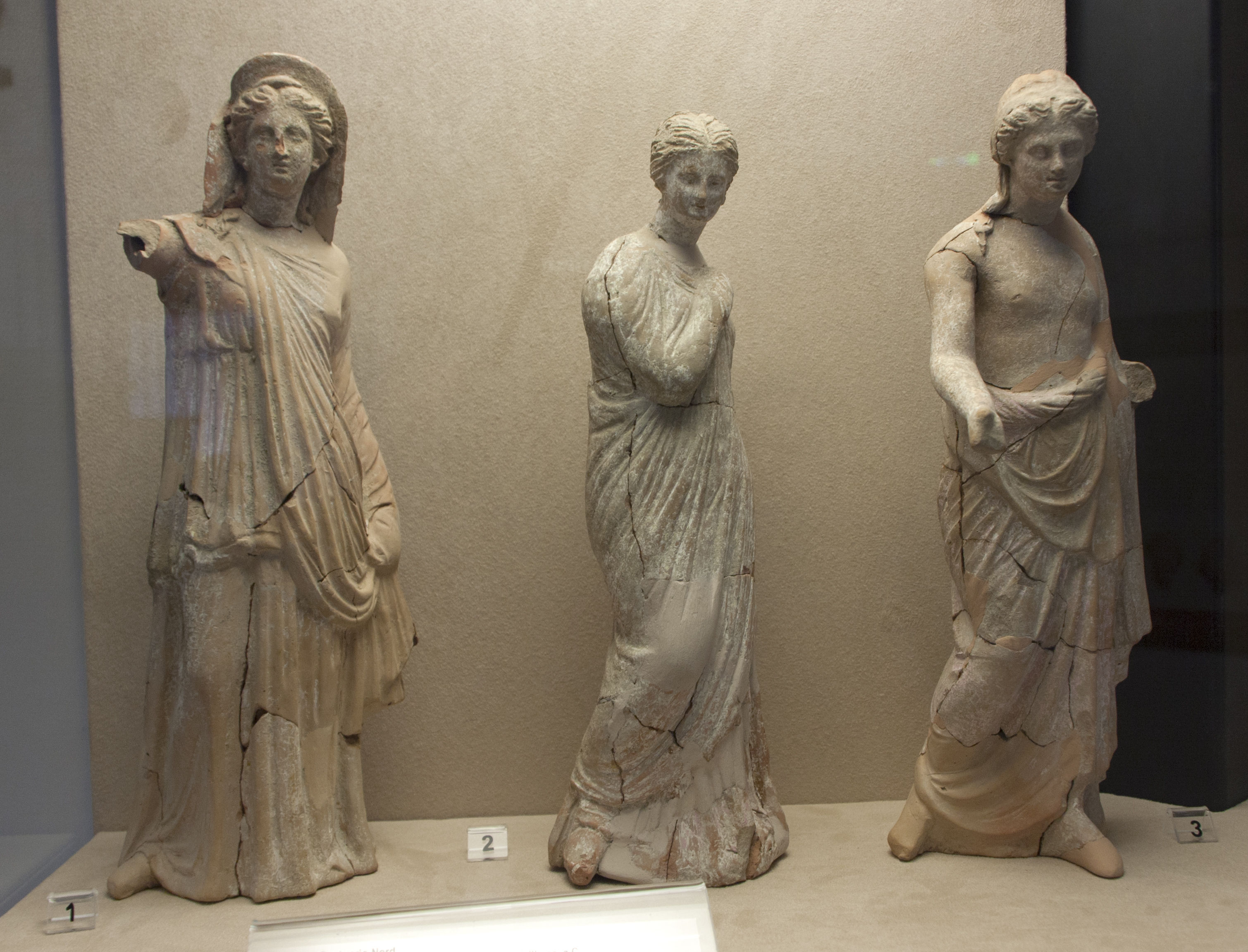 a sinistra: statua di Persefone prima metà del III sec a.C. al centro: statua femminile seconda metà del III sec a.C. a destra: statua inizia III sec a.C.